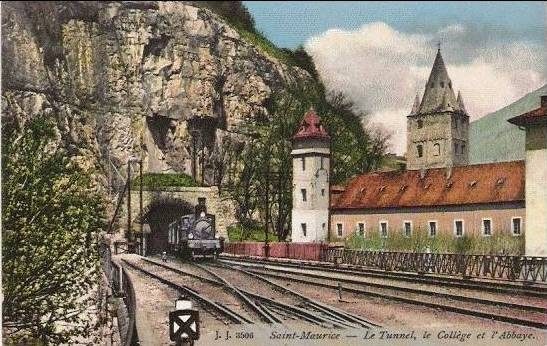 La construction de la galerie couverte à la sortie du tunnel fut réalisée en 1897, après l'éboulement du rocher le 14 avril 1897.